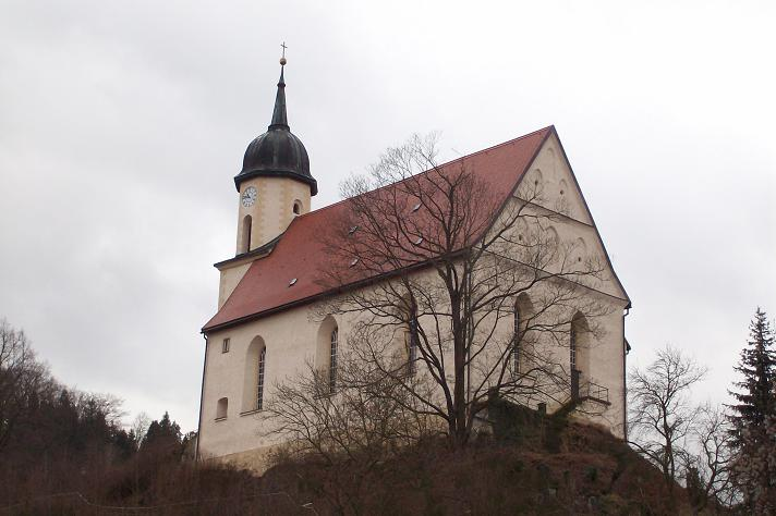 Bergkirche Tharandt